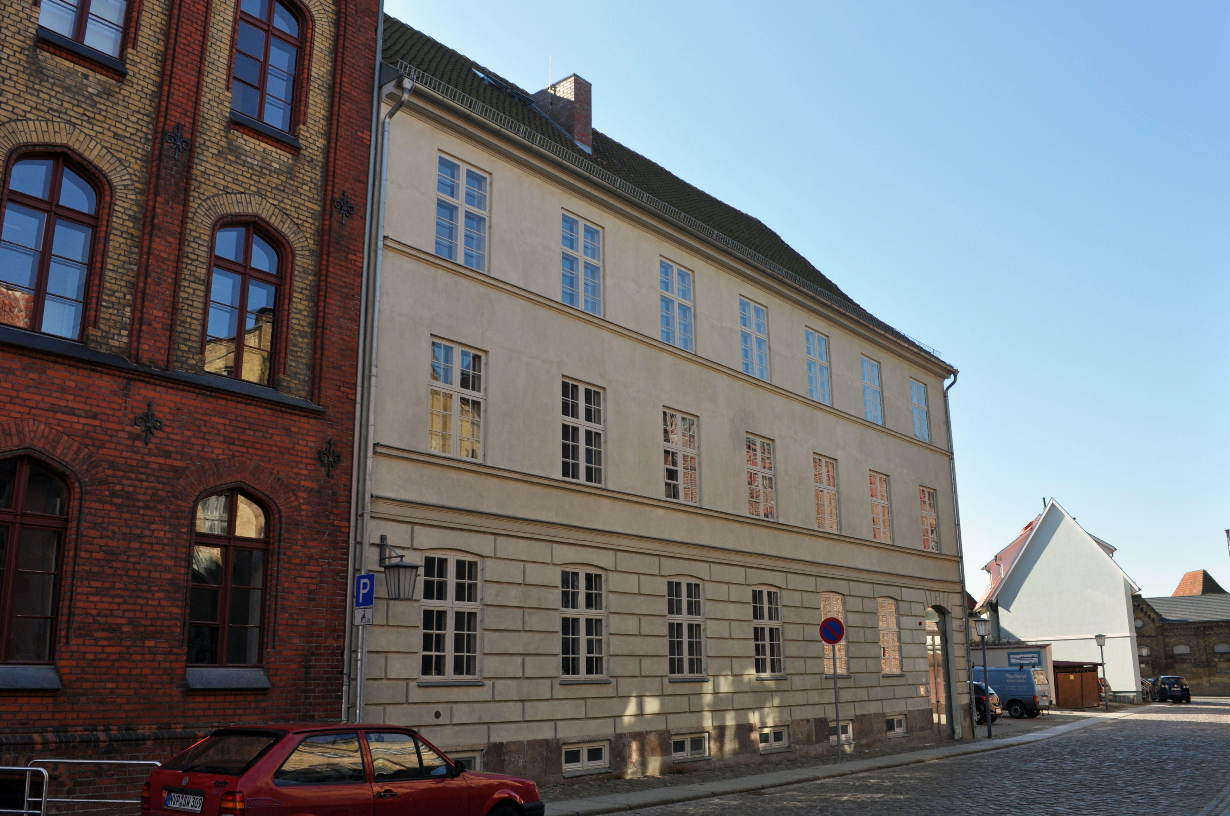 Gebäude bzw. Gebäudedetail in Stralsund. Straße und Hausnummer siehe Dateiname.